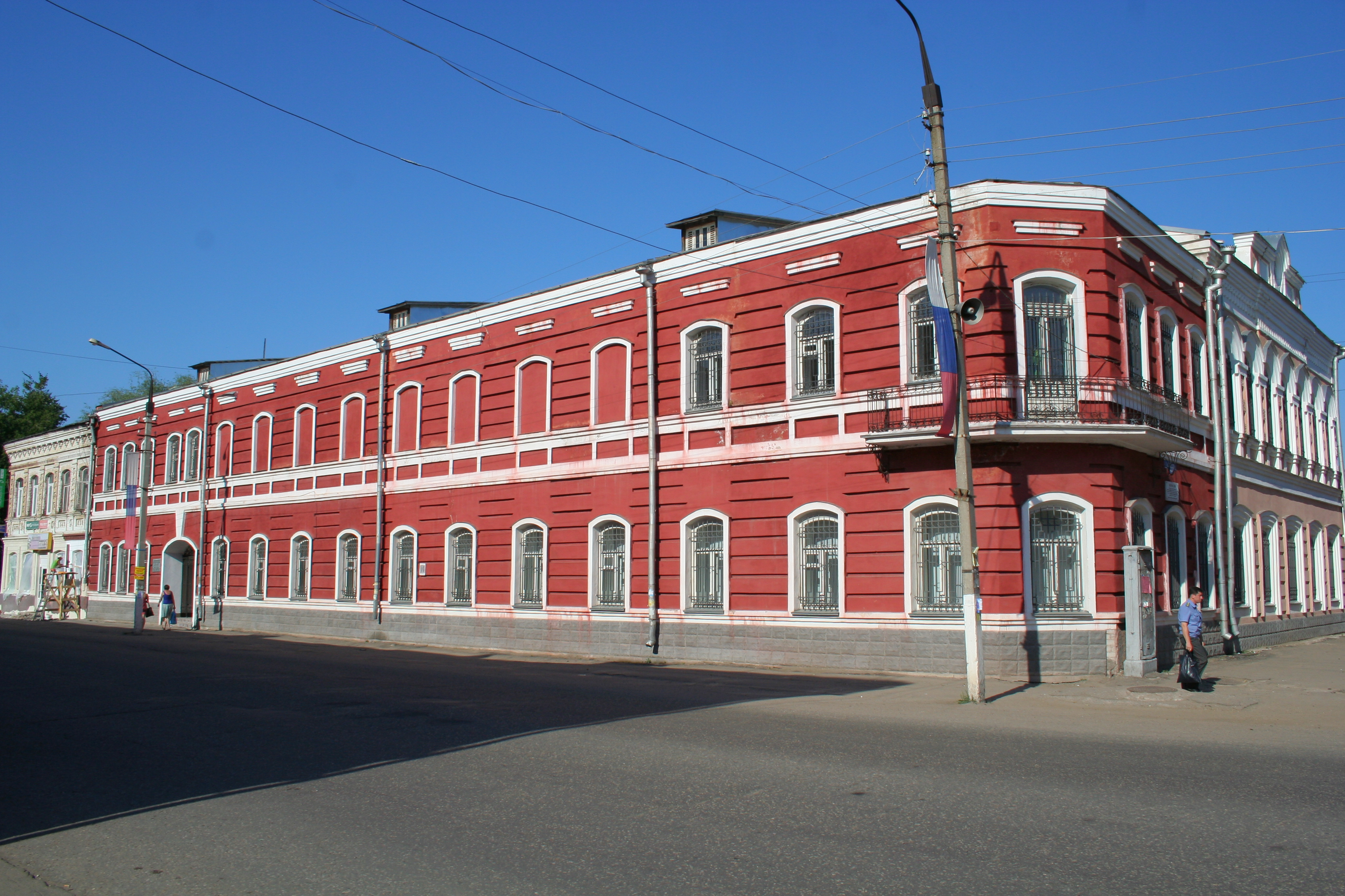 Ansichten der Stadt Wyschni Wolotschok (Oblast Twer, Russland). Heimatmuseum.